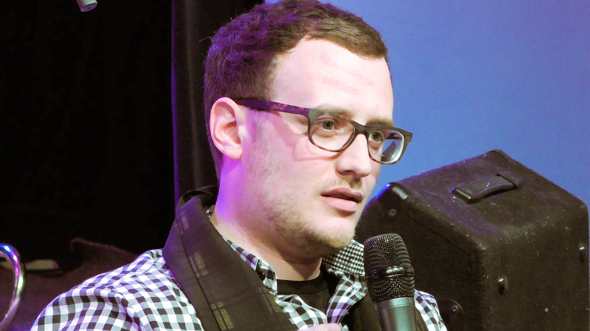 12.03.2017. Еврейский культурный центр на Никитской.